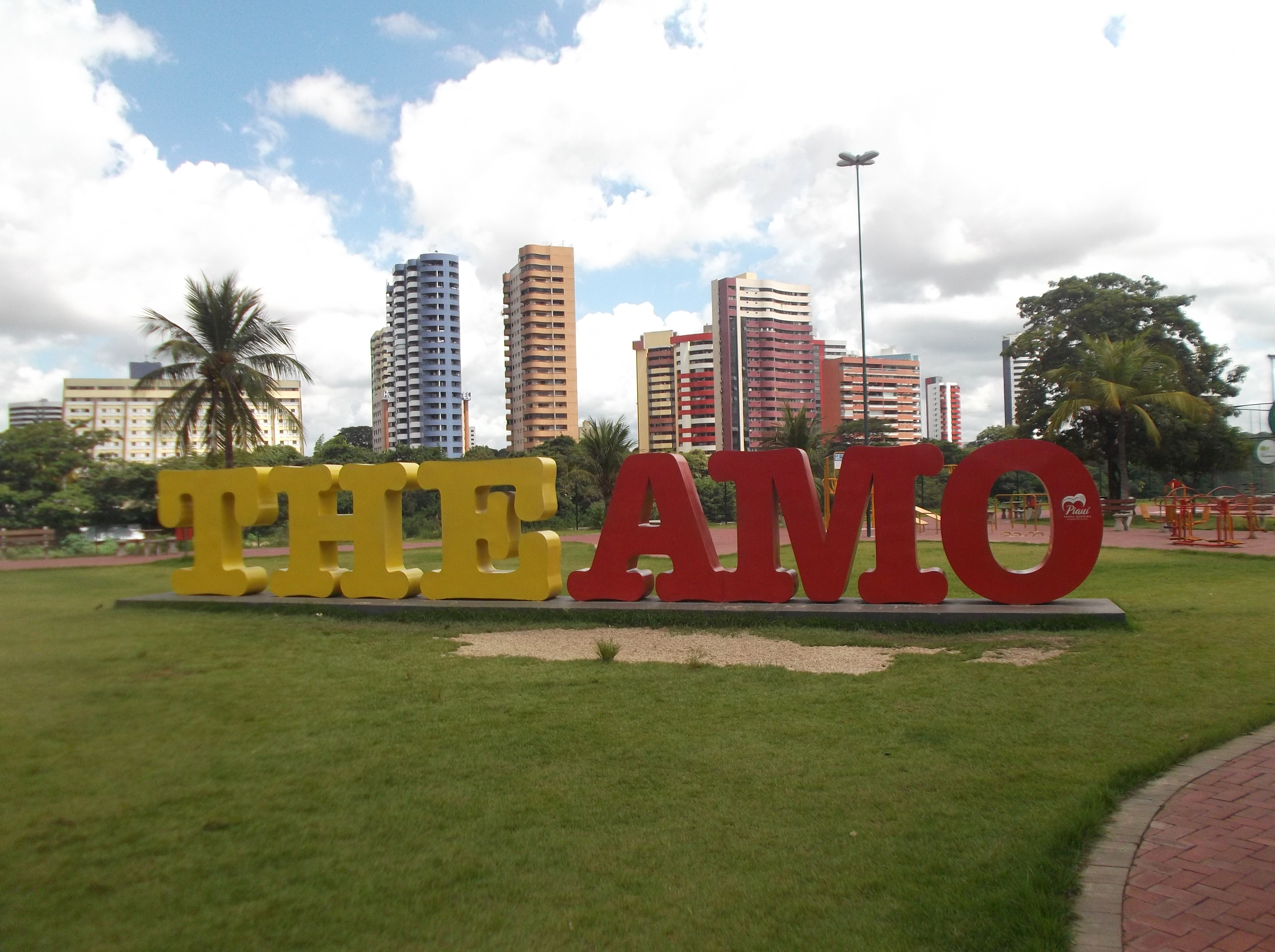 Letreiro no Parque Potycabana em Teresina, no Piauí.